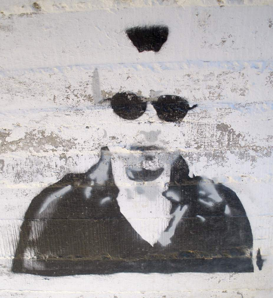 Graffiti en Legutio (Álava)